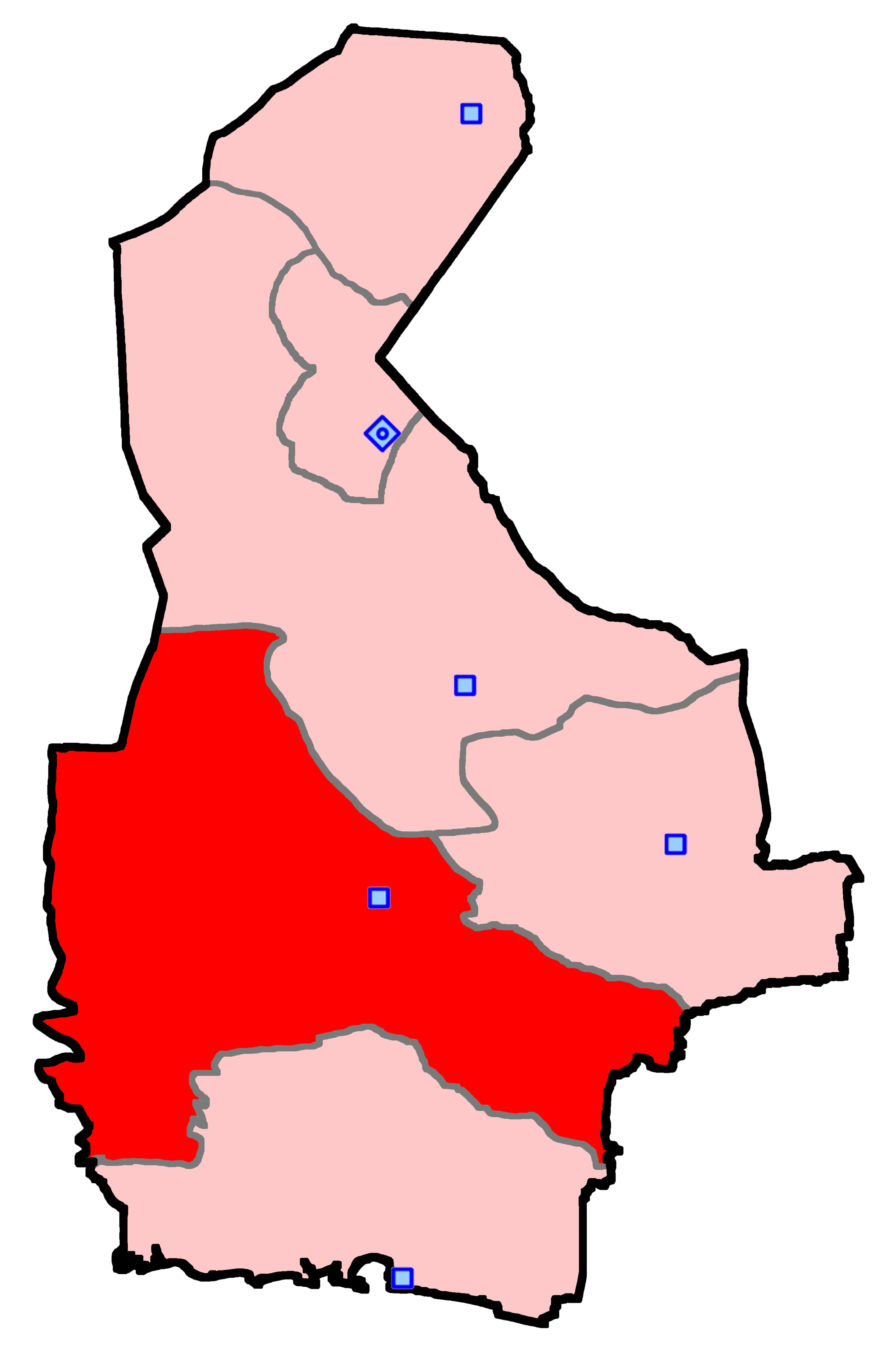 حوزه‌ ایرانشهر برای انتخابات مجلس شورای اسلامی